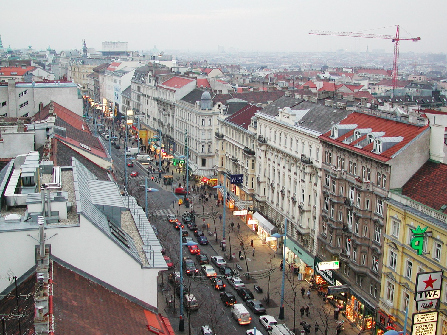 Description: The Mariahilferstraße in Vienna - Die Wiener Mariahilferstraße own image, taken in Nov. 26, 2002 Photographer: Herbert Ortner, Vienna, Austria